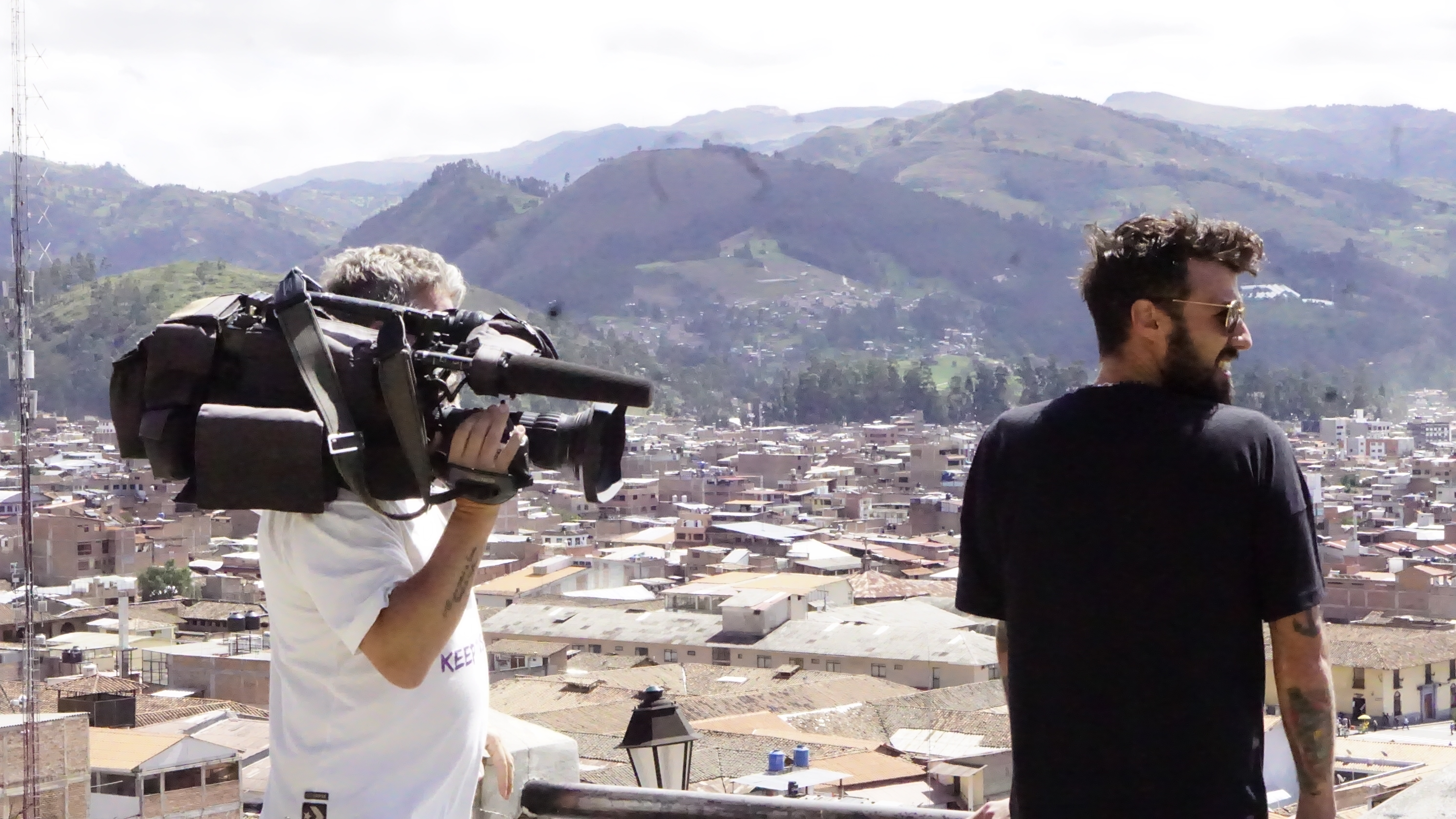 Eddie Fitte grabando el documental "Las Podridas" en Cajamarca, Perú, durante el 2018.